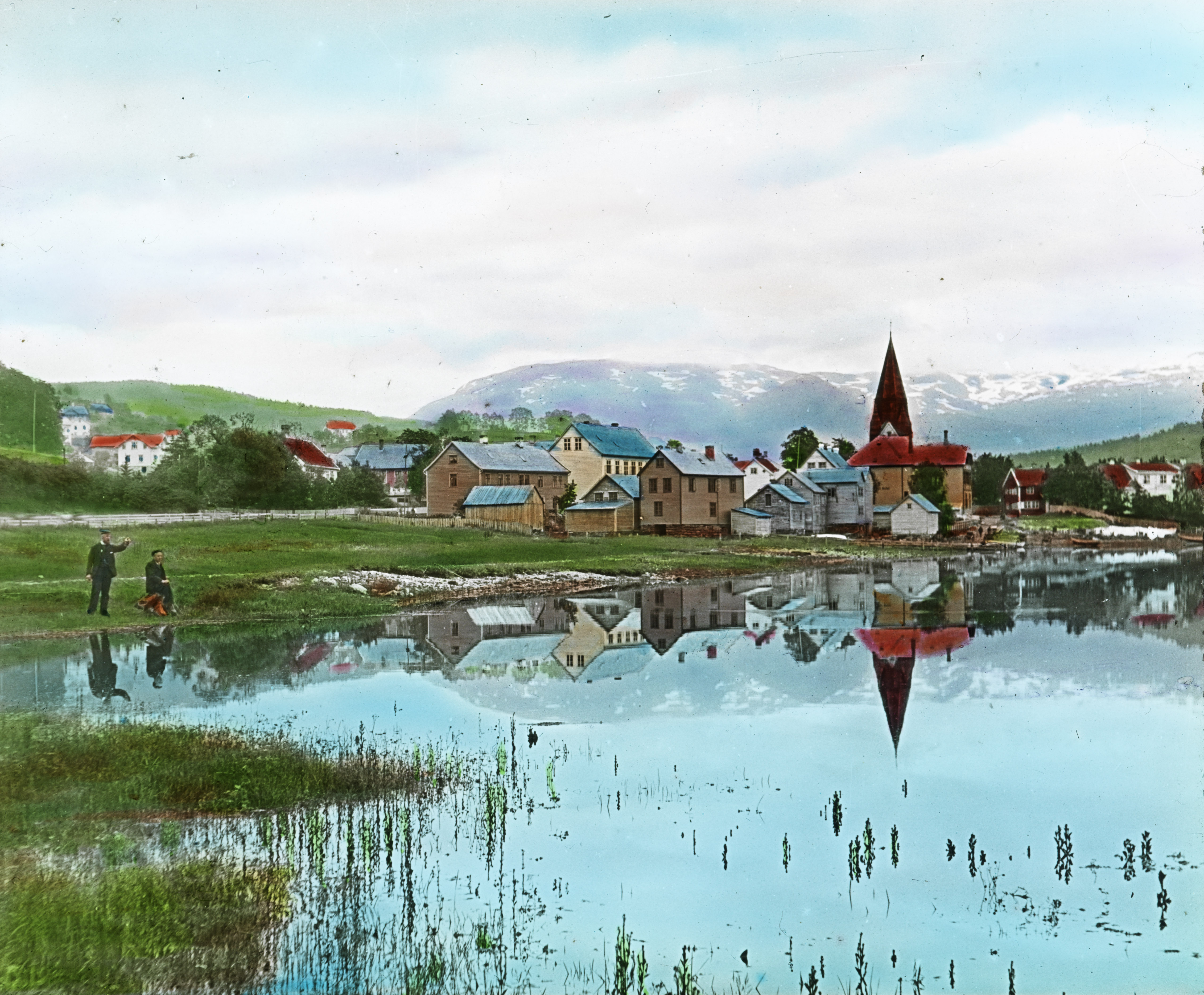 SFFf-1992078.0041 Voss.